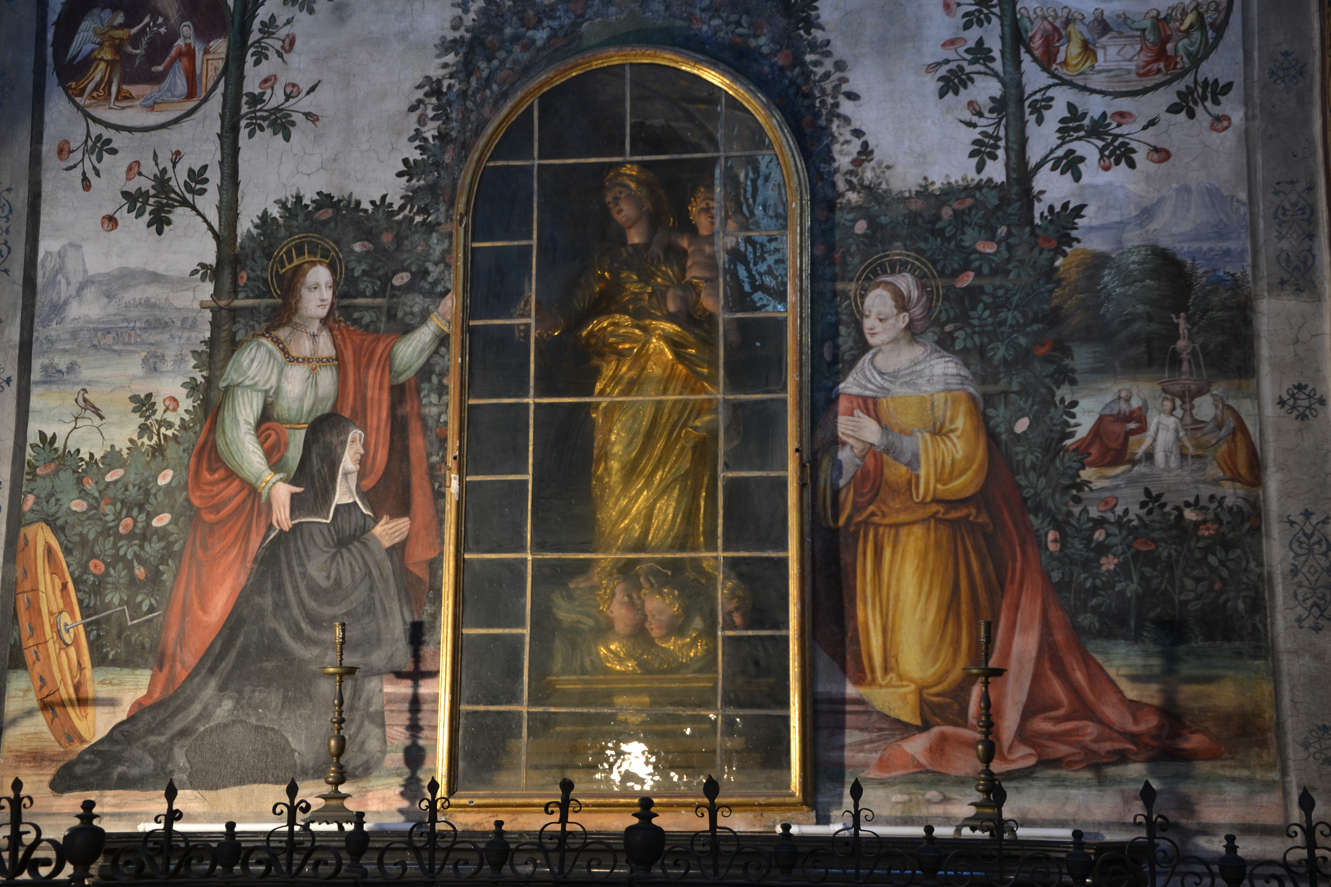 Chiesa di San Vittore (Meda). ricostruita nel Cinquecento e già annessa ad un importante monastero femminile della città appartenente all'ordine benedettino. É decorata internamente con un vasto ciclo affreschi di scuola leonardesca di tale estensione da essere stata soprannominata "Cappella Sistina" della Brianza. Attualmente appartiene al complesso della Villa Antona Traversi.